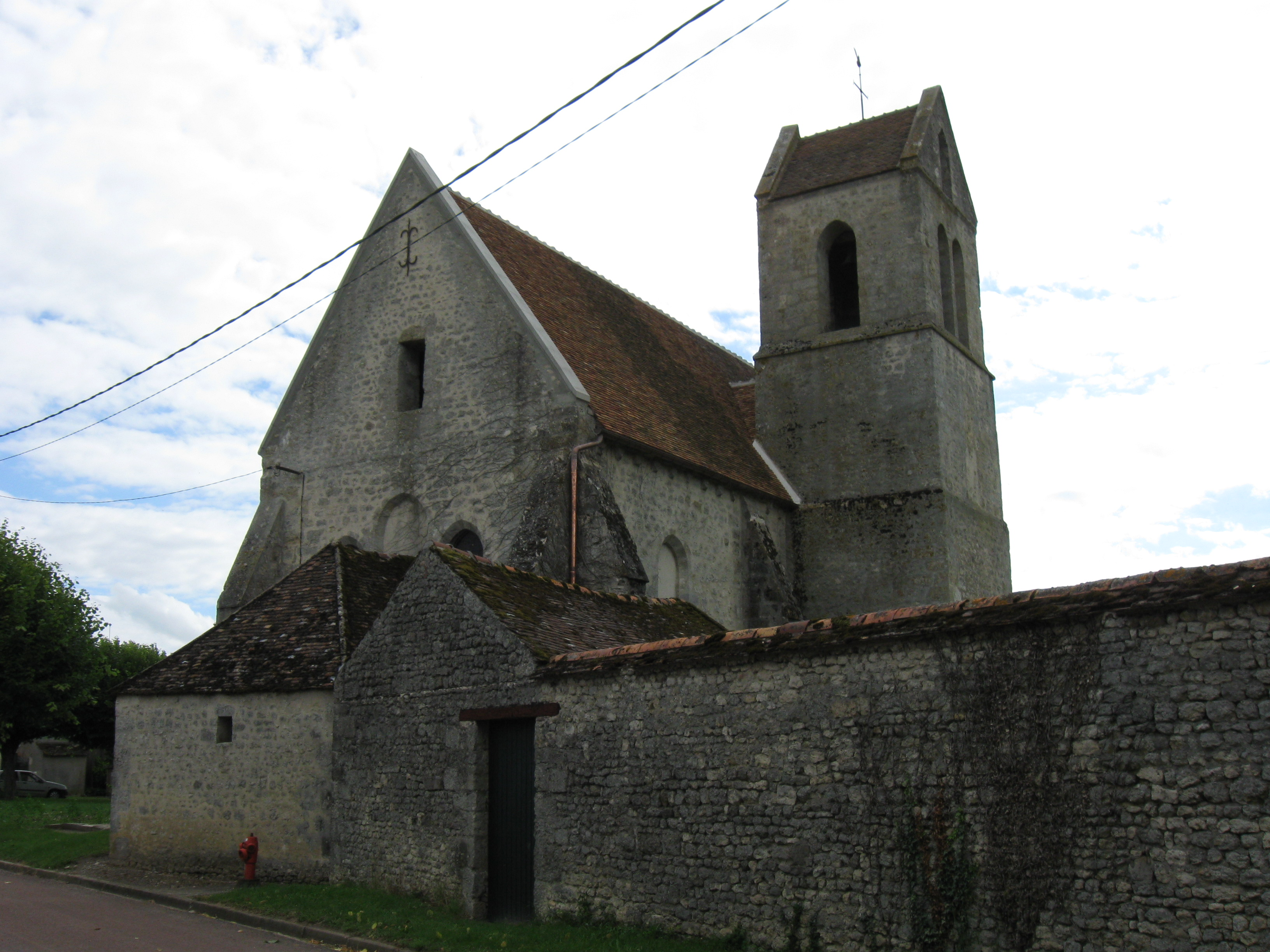 Église catholique Saint-Amand. (Burcy, département de la Seine et Marne, région Île-de-France).